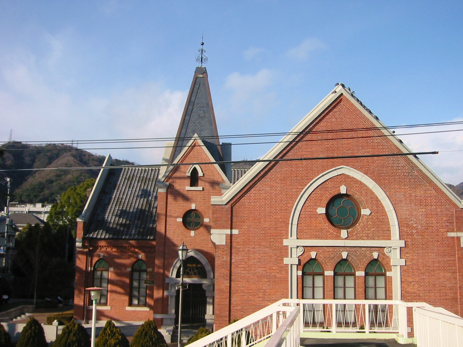 神戸 王子市民ギャラリー(旧関西学院ブランチ・メモリアル・チャペル)竣功:明治37年（1904年） 設計:M・ウィグノール